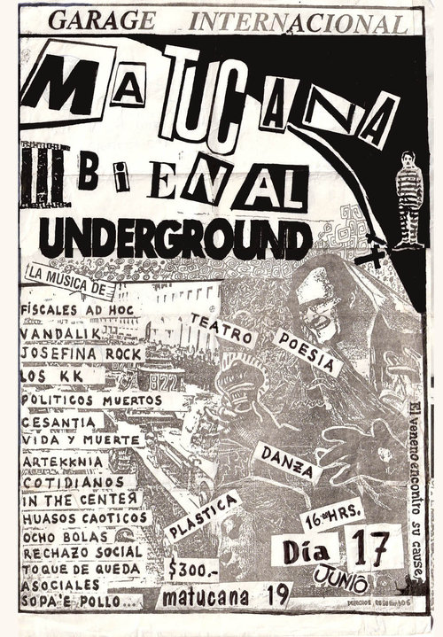 Primer festival Punk realizado en Chile